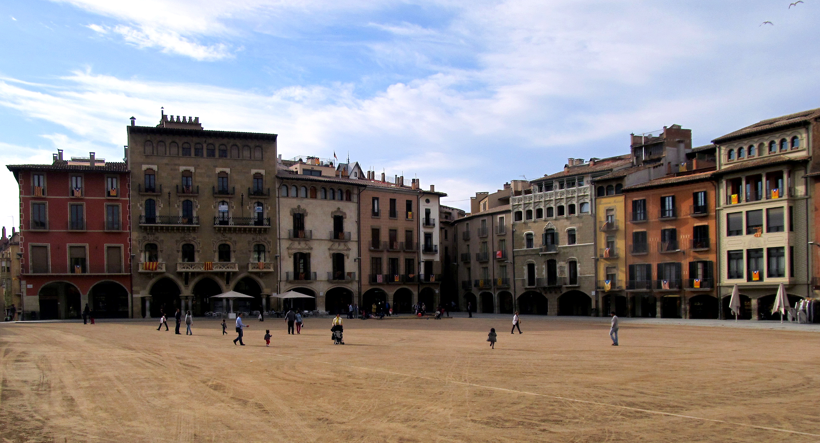 Vic, Plaça Major